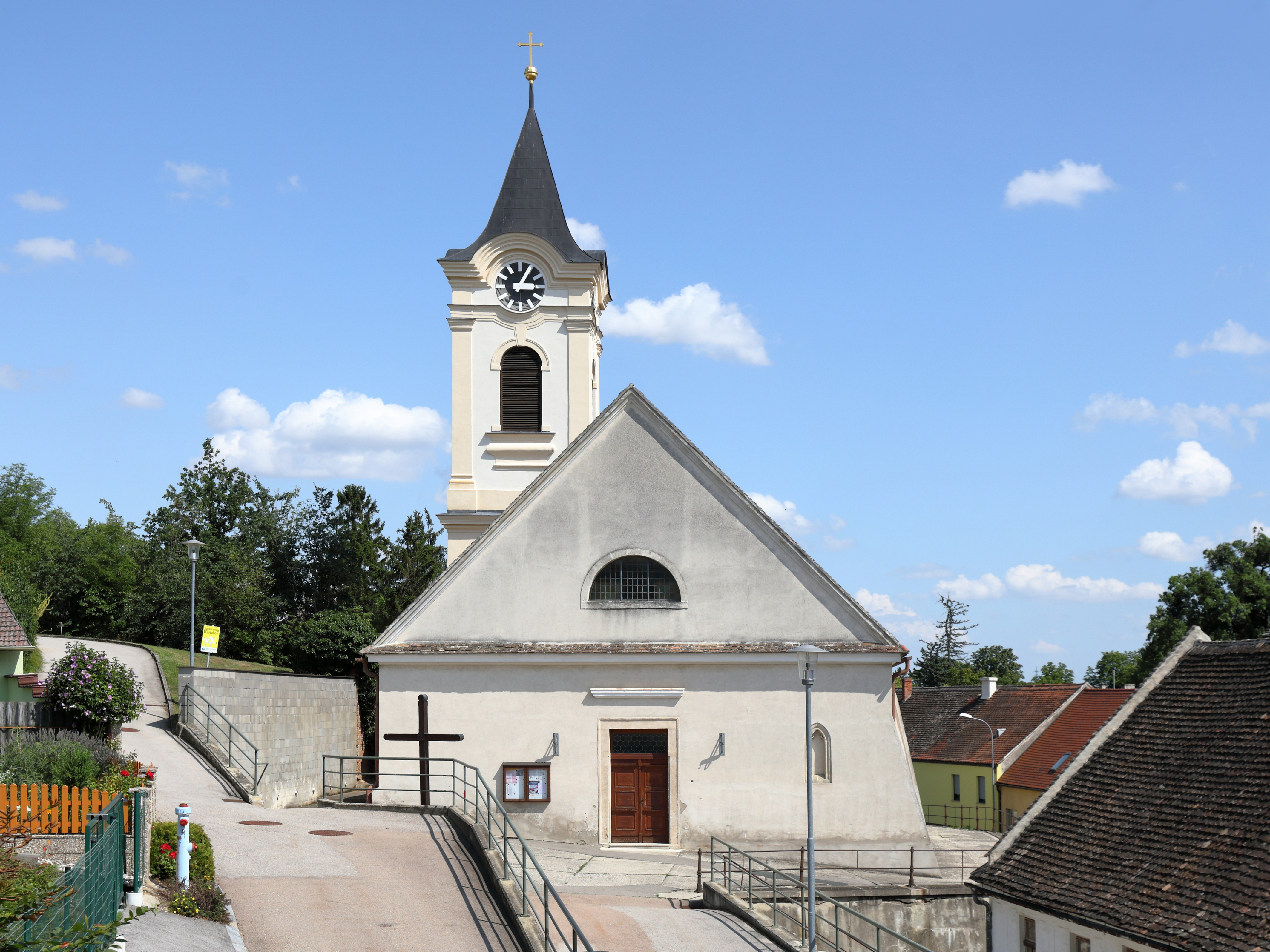 Westansicht der röm.-kath. Pfarrkirche hl. Johannes der Täufer in Mittergrabern, ein Ortsteil der niederösterreichischen Marktgemeinde Grabern.Ursprünglich eine gotische Staffelhallenkirche mit einem Nordturm aus dem 13. Jahrhundert. Später erfolgten frühbarocke Umbauten und um die Mitte des 19. Jahrhunderts fand eine umfassende Erweiterung Richtung Osten statt.